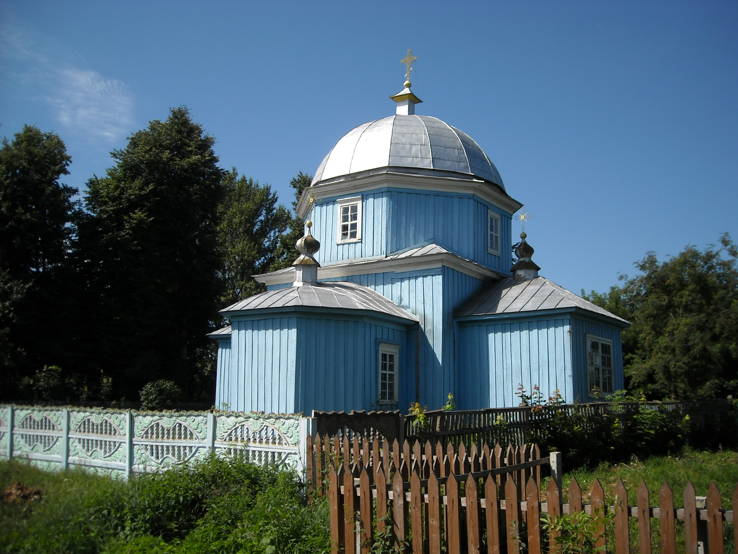 Беларуская (тарашкевіца): Пакроўская царква. в. Вялікія Лазіцы This is a photo of Belarusian heritage monument. Reference number: 513Г000574 ( WLM)